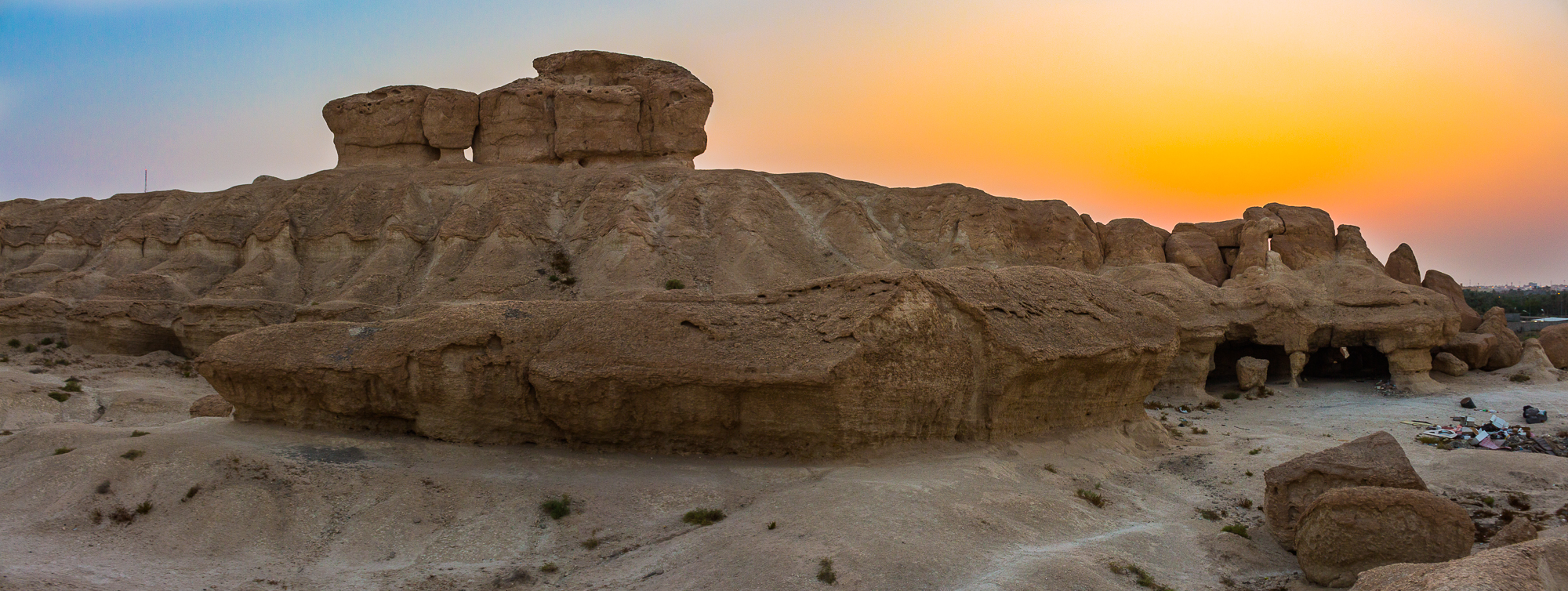 منظر الغروب للجبل